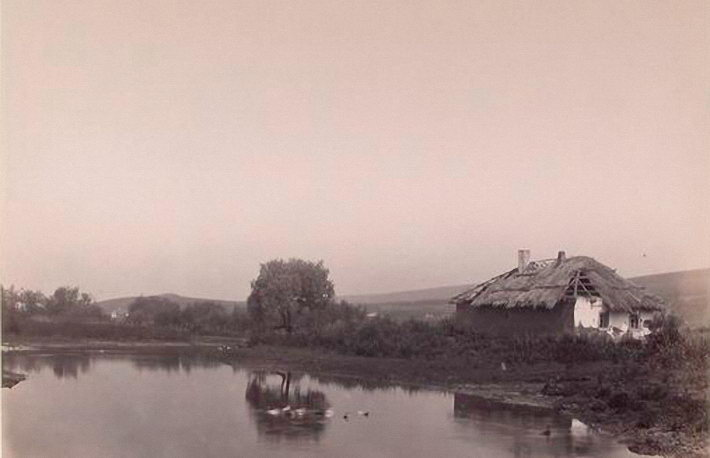 Râul Bîc - fotografie de epocă